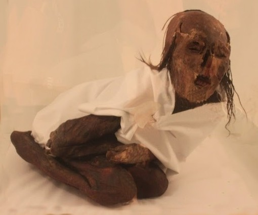 Momia de cerro Chuscha. Fotografiado en el MAAM, Marzo de 2012